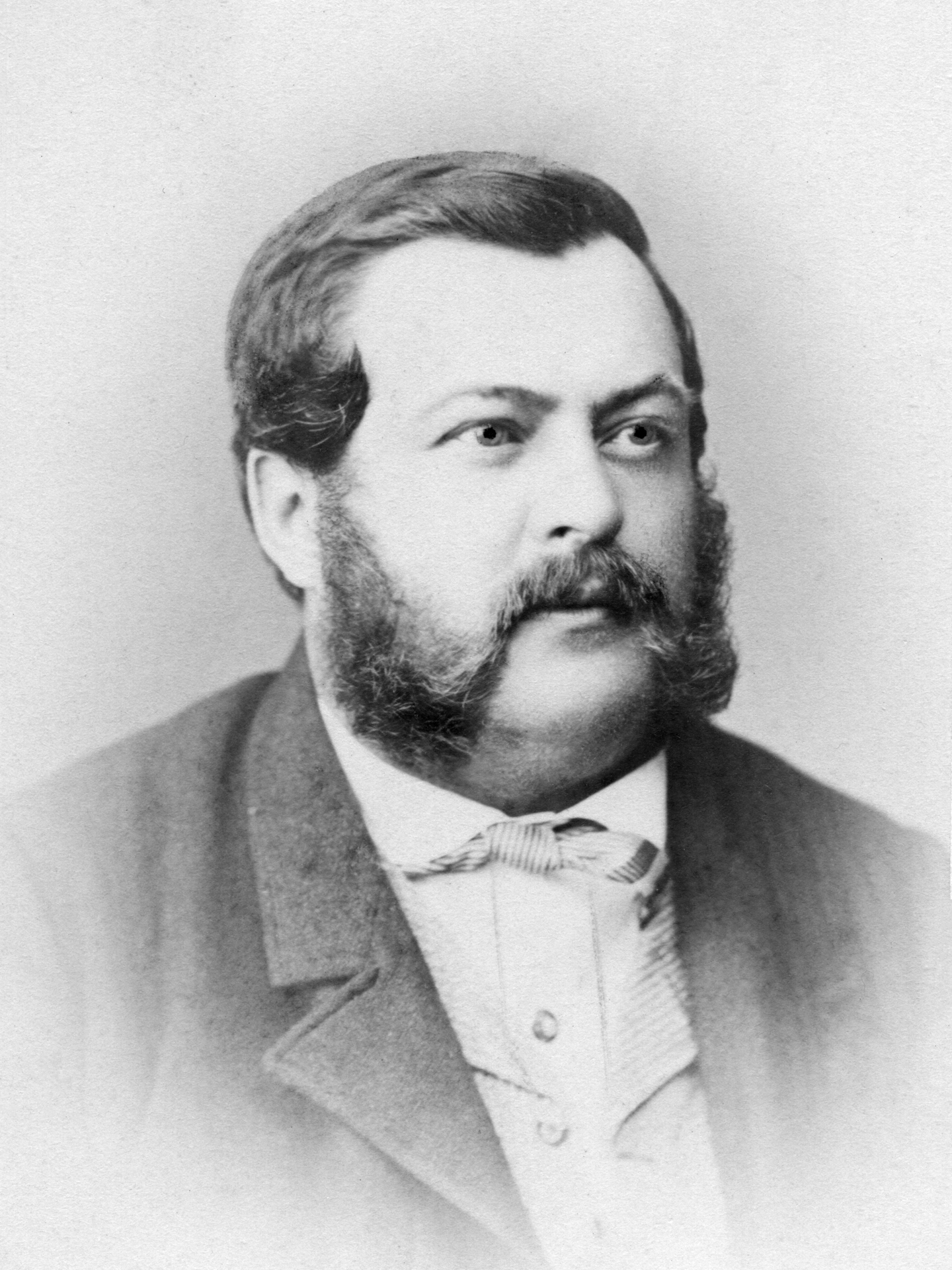 Portrait von Franz Zeitlinger, Foto von Baldi & Würthle Salzburg